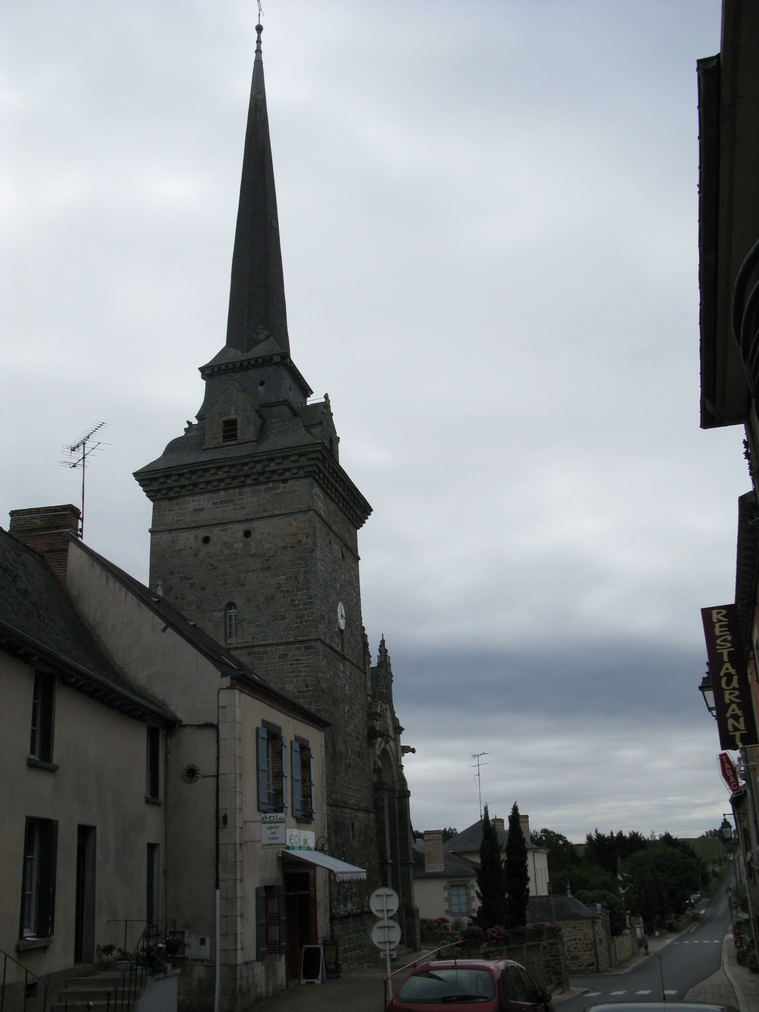 Église Saint-Sulpice de Gennes-sur-Seiche